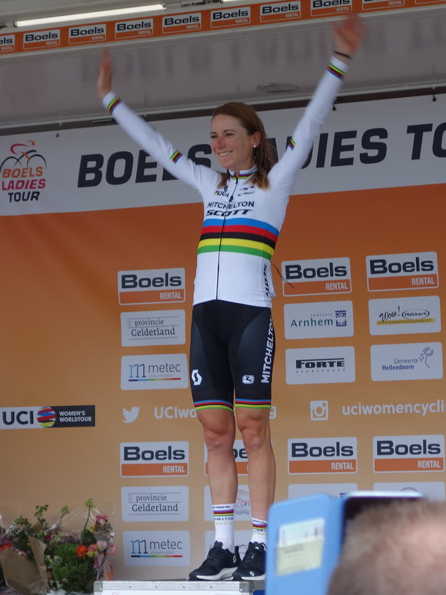 Wereldkampioene Annemiek van Vleuten won de proloog op het Tom Dumoulin Bike Park in Sittard in de Boels Ladies Tour 2019